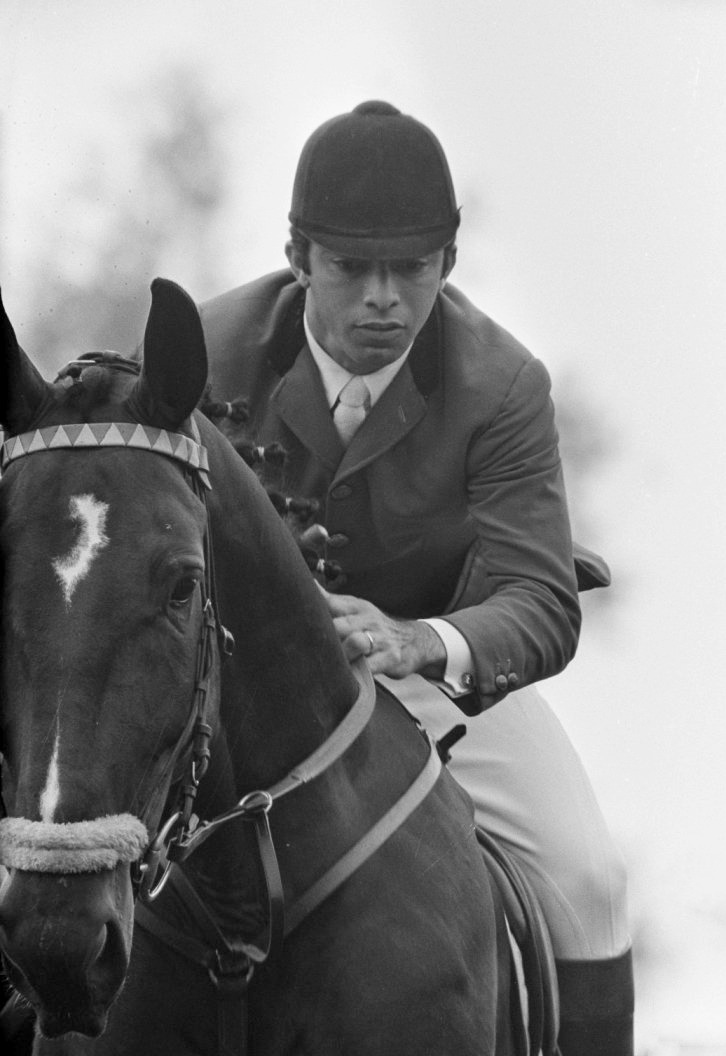 CHJO 1968 te Rotterdam. Pessoa in actie op het paard Feldherr